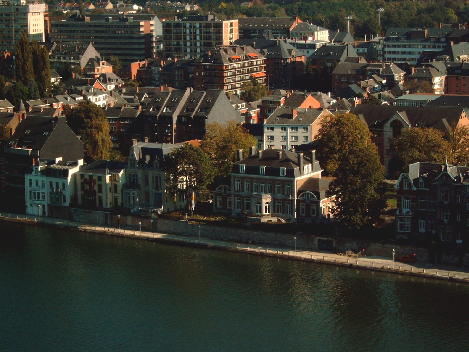 Het Elysette in Jambes, gezien vanaf de Naamse Citadel. Eigen opname.